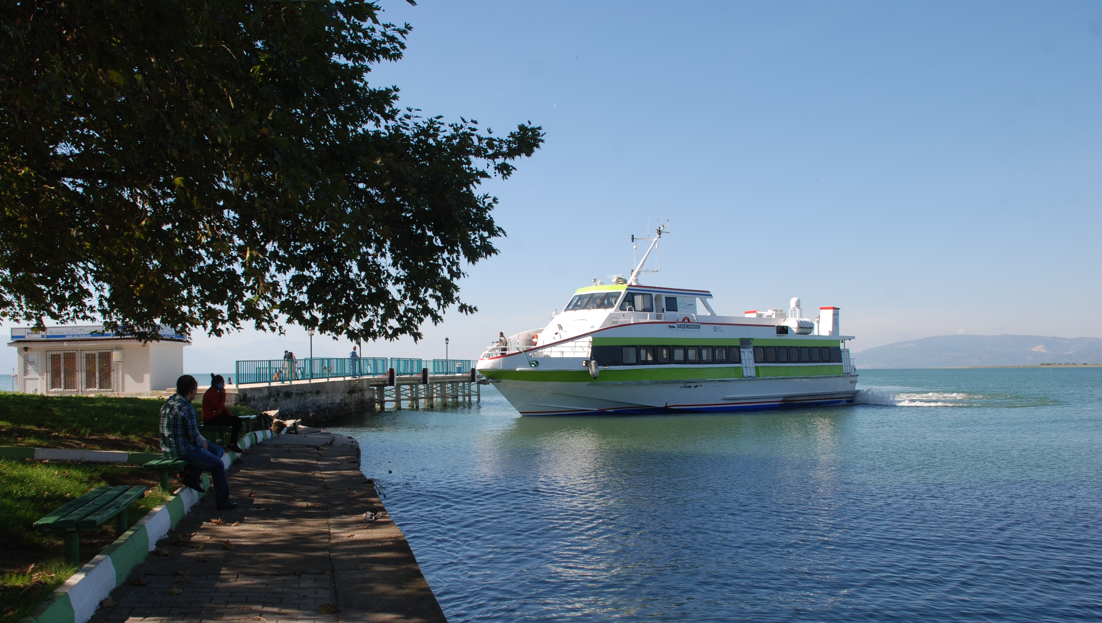 Akşemsettin Feribotu İznik Gölünde.